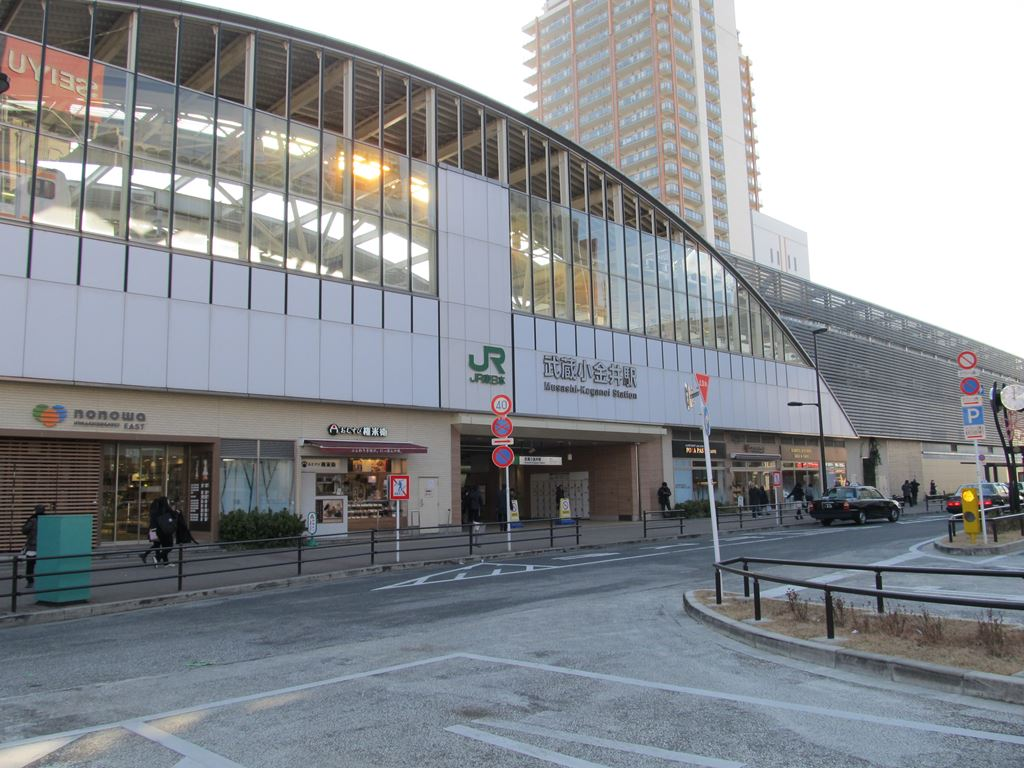 武蔵小金井。小金井市東京都。